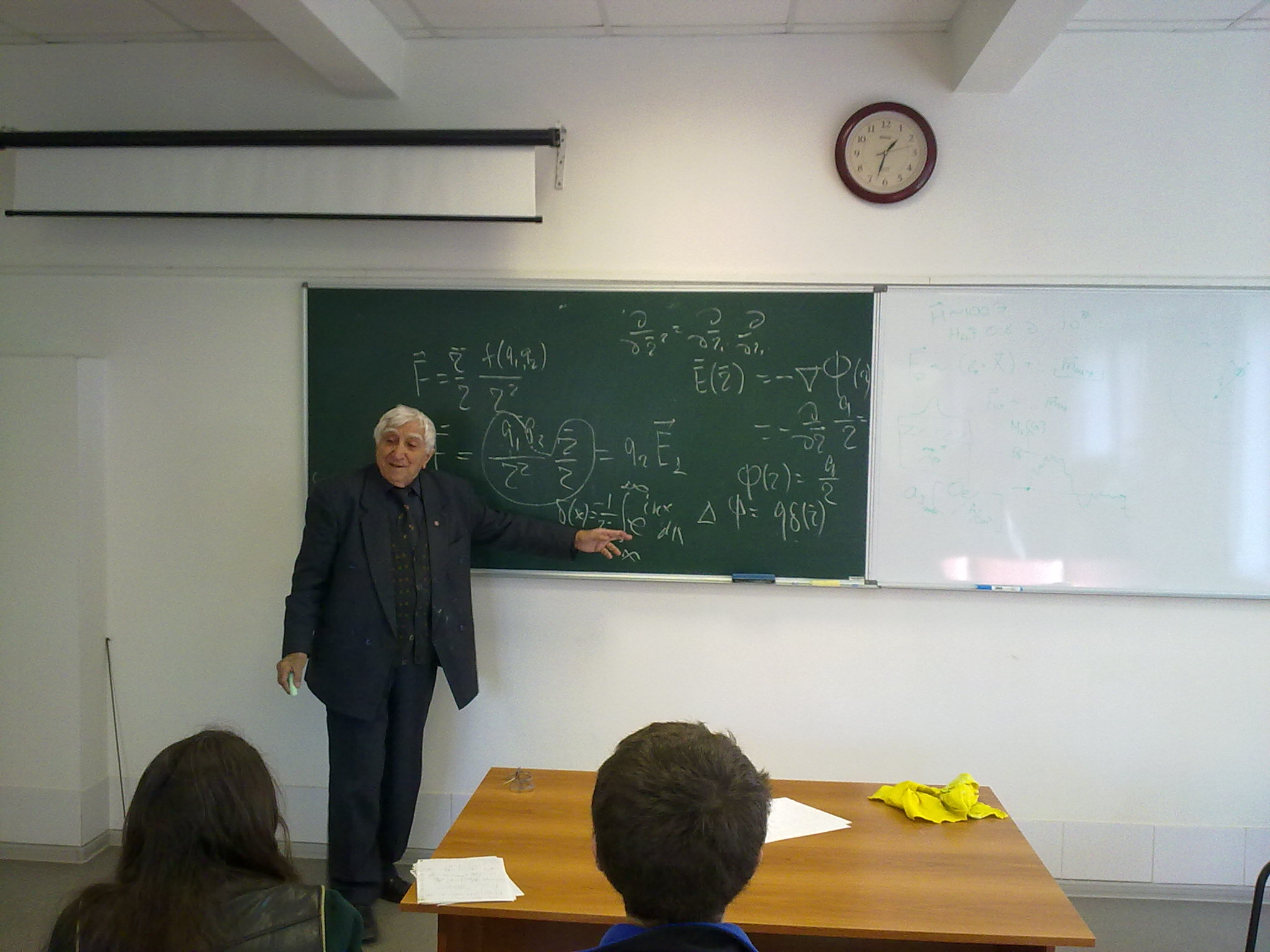 Анри Амвросиевич Рухадзе ведет занятие по электродинамике для студентов в Институте общей физики им. А.М. Прохорова (плазменный корпус)